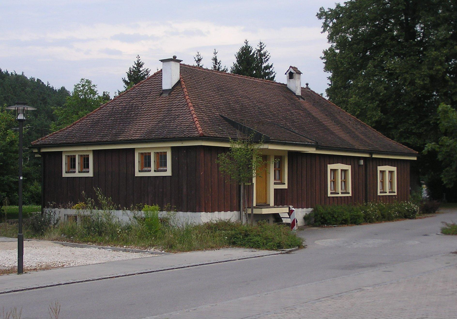 Schmidmuehlen (Ehemaliger Bahnhof)